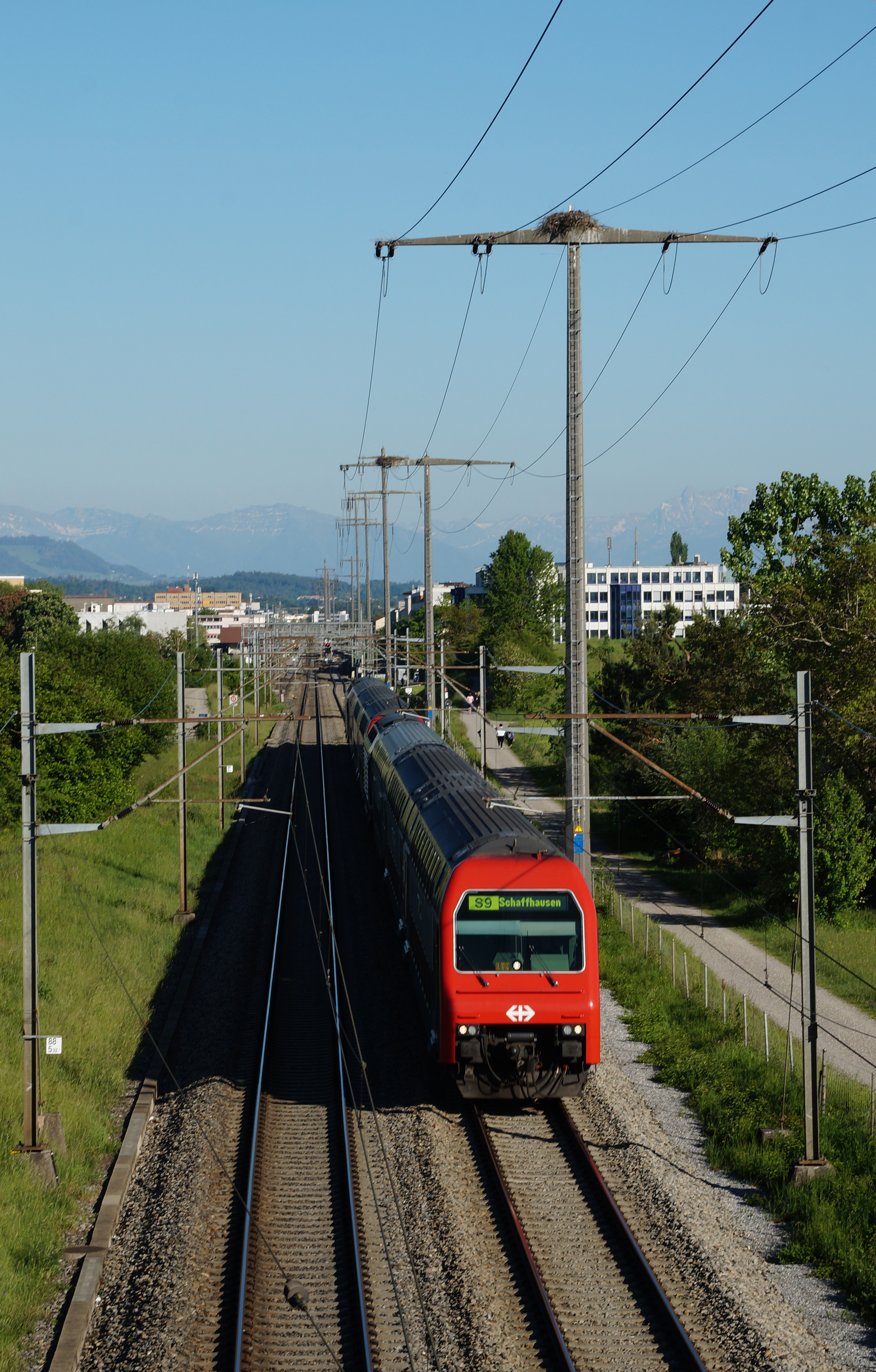 Weissstorch auf einem Strommasten über der Glatttallinie der S-Bahn Zürich – Gfenn, Dübendorf, Schweiz